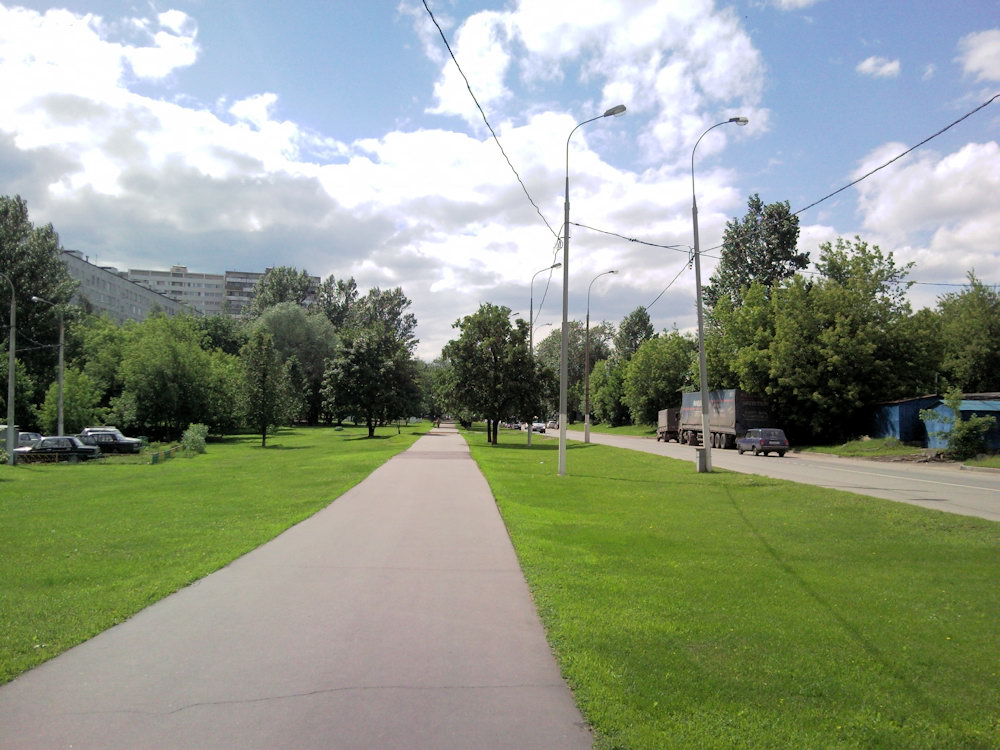 Вид на Элеваторную улицу в Москве.